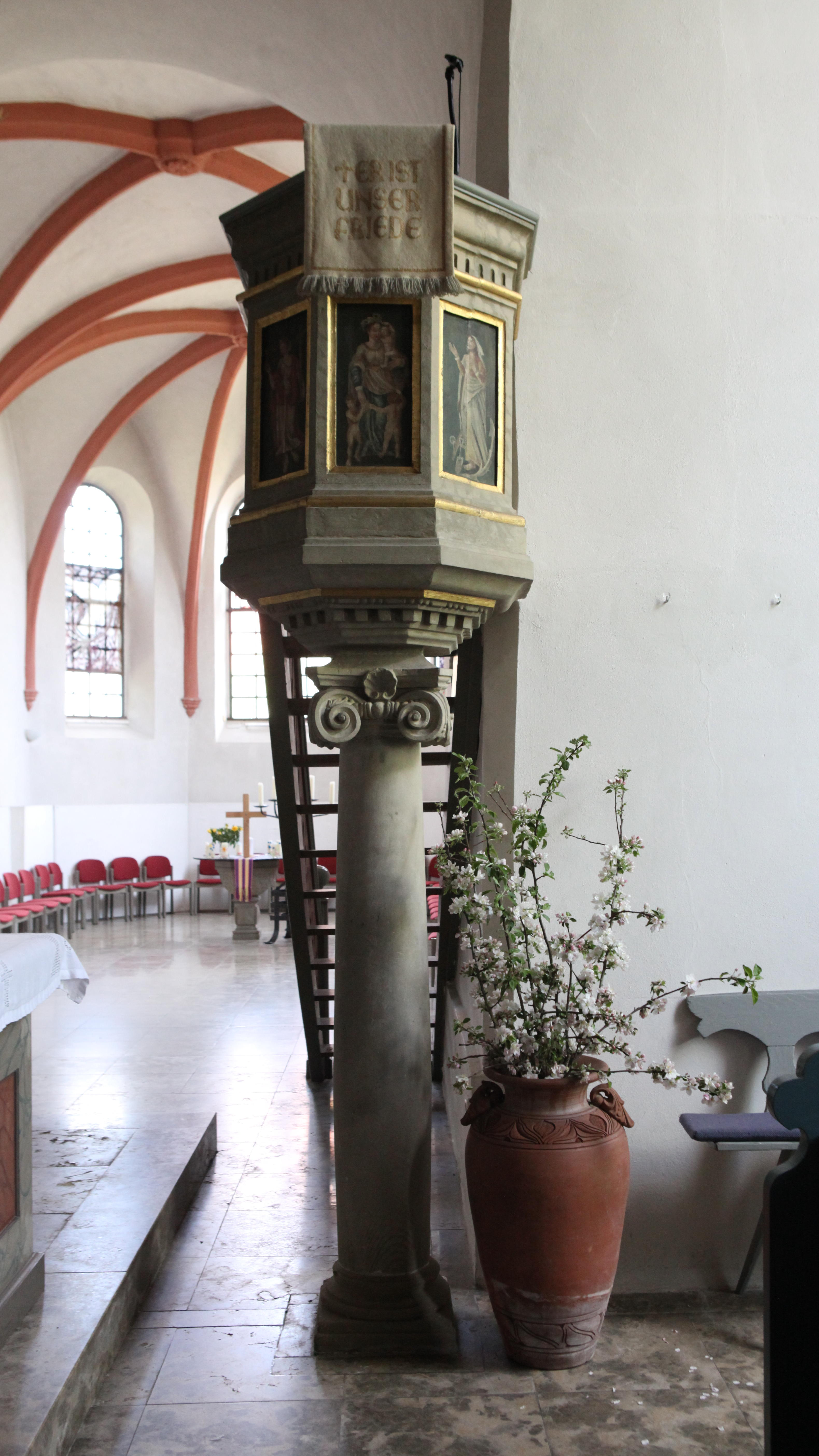 Meeder, St. Laurentius